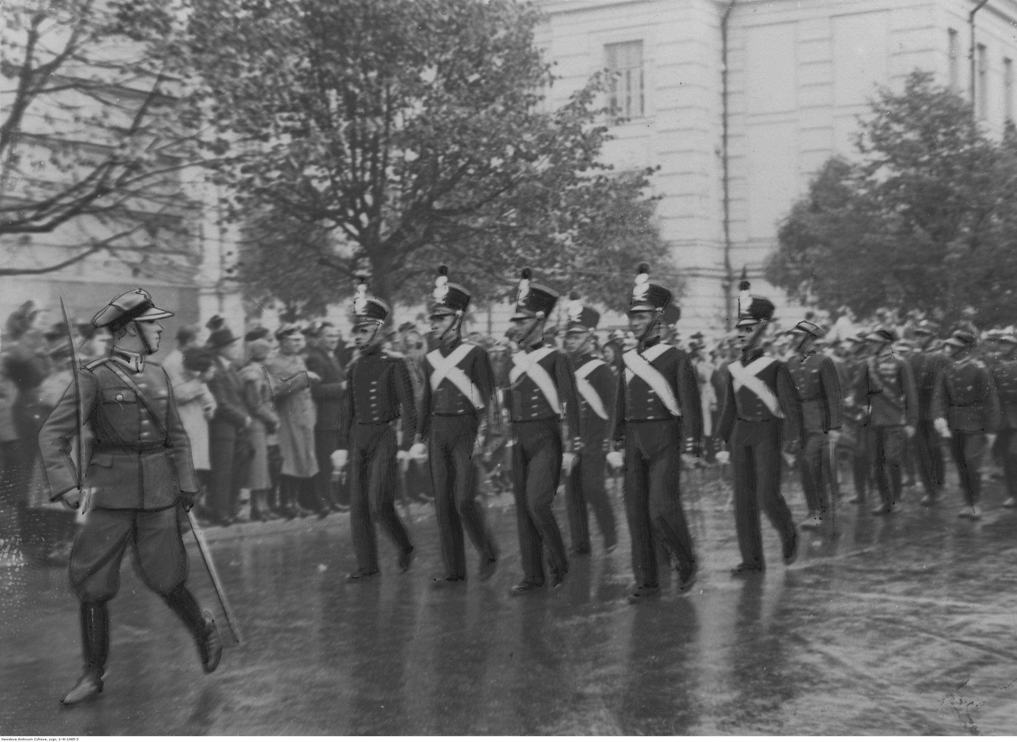 XX - lecie 1 Pułku Artylerii Lekkiej w Wilnie. Fragment defilady czołowej grupy w mundurach historycznych artylerii polskiej na placu Łukiskim w Wilnie, podczas święta 1 pal-u; październik 1934 r. Koncern Ilustrowany Kurier Codzienny - Archiwum Ilustracji. Sygnatura: 1-W-1485-3